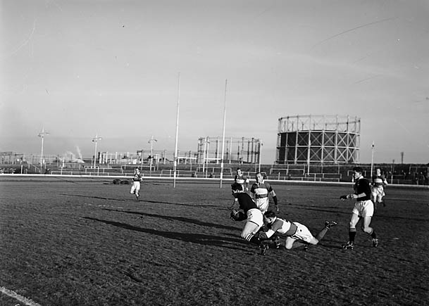 Teitl Cymraeg/Welsh title: Tîm Rygbi'r Gynghrair Caerdydd yn chwarae yn erbyn Seland Newydd. Ffotograffydd/Photographer: Geoff Charles (1909-2002) Dyddiad/Date: 21/12/1951 Cyfrwng/Medium: Negydd ffilm / Film negative Cyfeiriad/Reference: (gch02482) Rhif cofnod / Record no.: 3368336 Rhagor o wybodaeth am gasgliad Geoff Charles yn Llyfrgell Genedlaethol Cymru More information about the Geoff Charles Collection at the National Library of Wales Mae ffotograffau Geoff Charles hefyd yn rhan o Broject Europeana Libraries Geoff Charles' photographs also form part of the Europeana Libraries Project